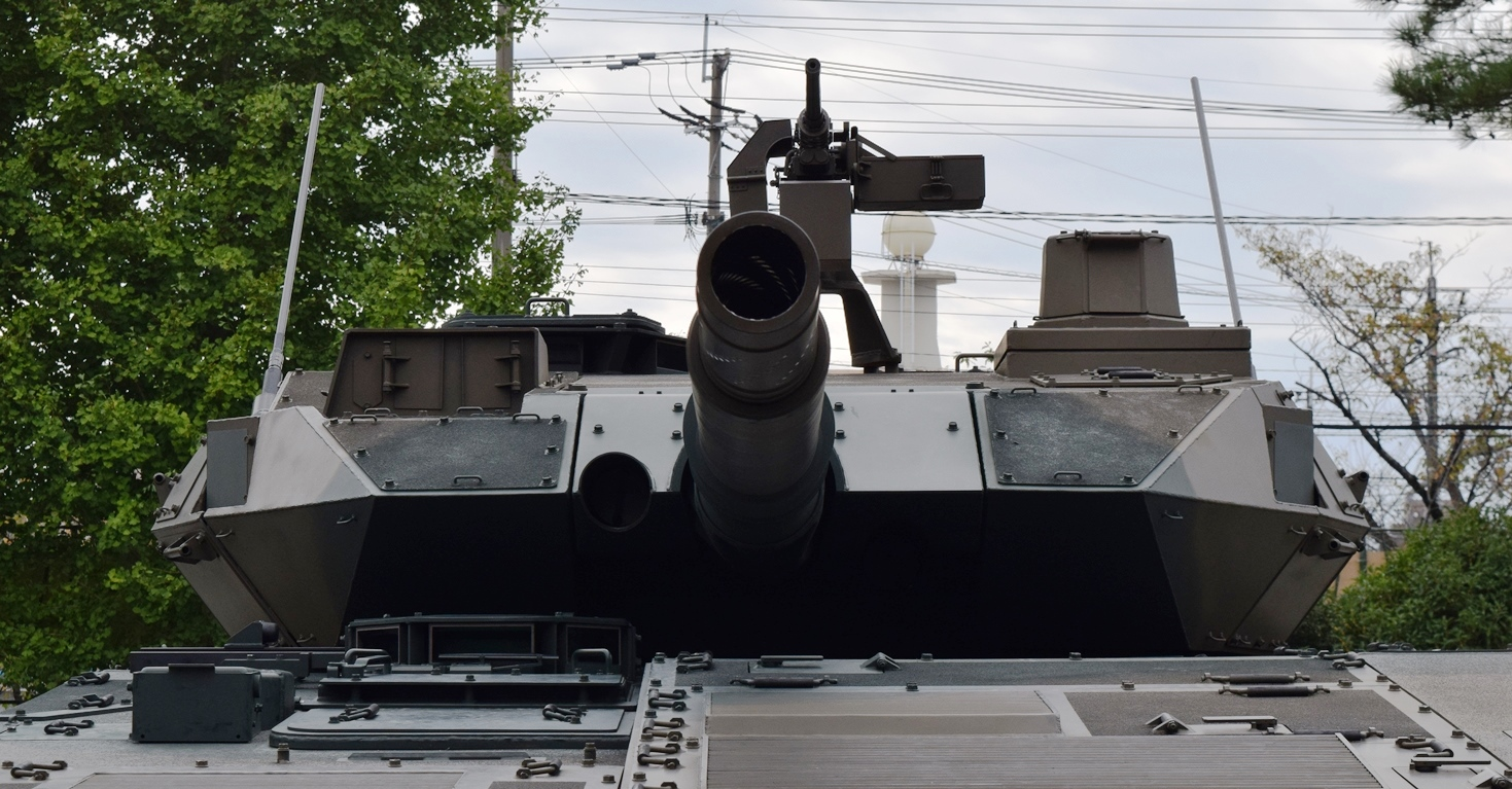 H29.10.01健軍駐屯地にて撮影